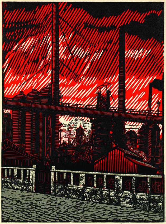 Jaroslav Dobrovolský: Ze železáren ve Víkovicích – z cyklu Ostrava, 1940, barevný linoryt